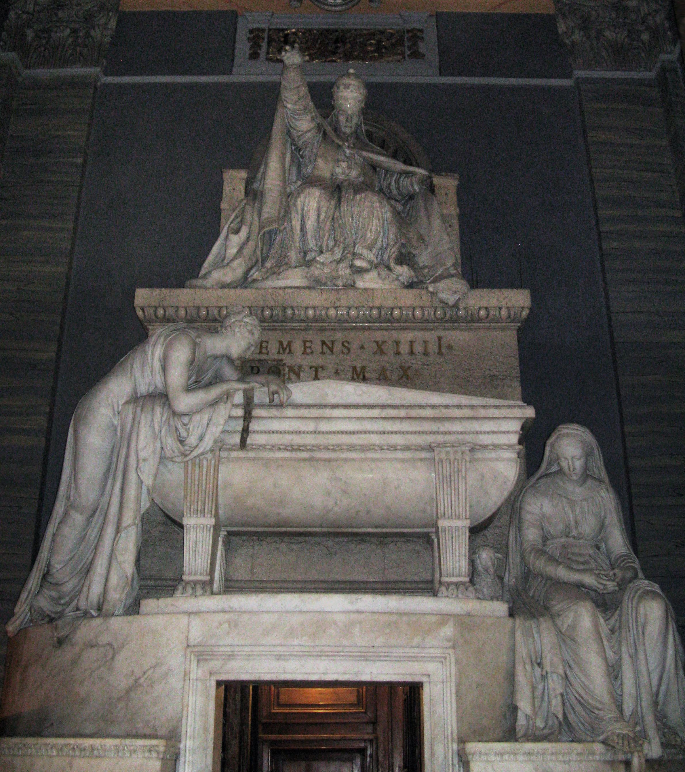 Tomb of Pope Clement XIV Gregorovius by Antonio Canova at Basilica dei Santi Apostoli in Rome.